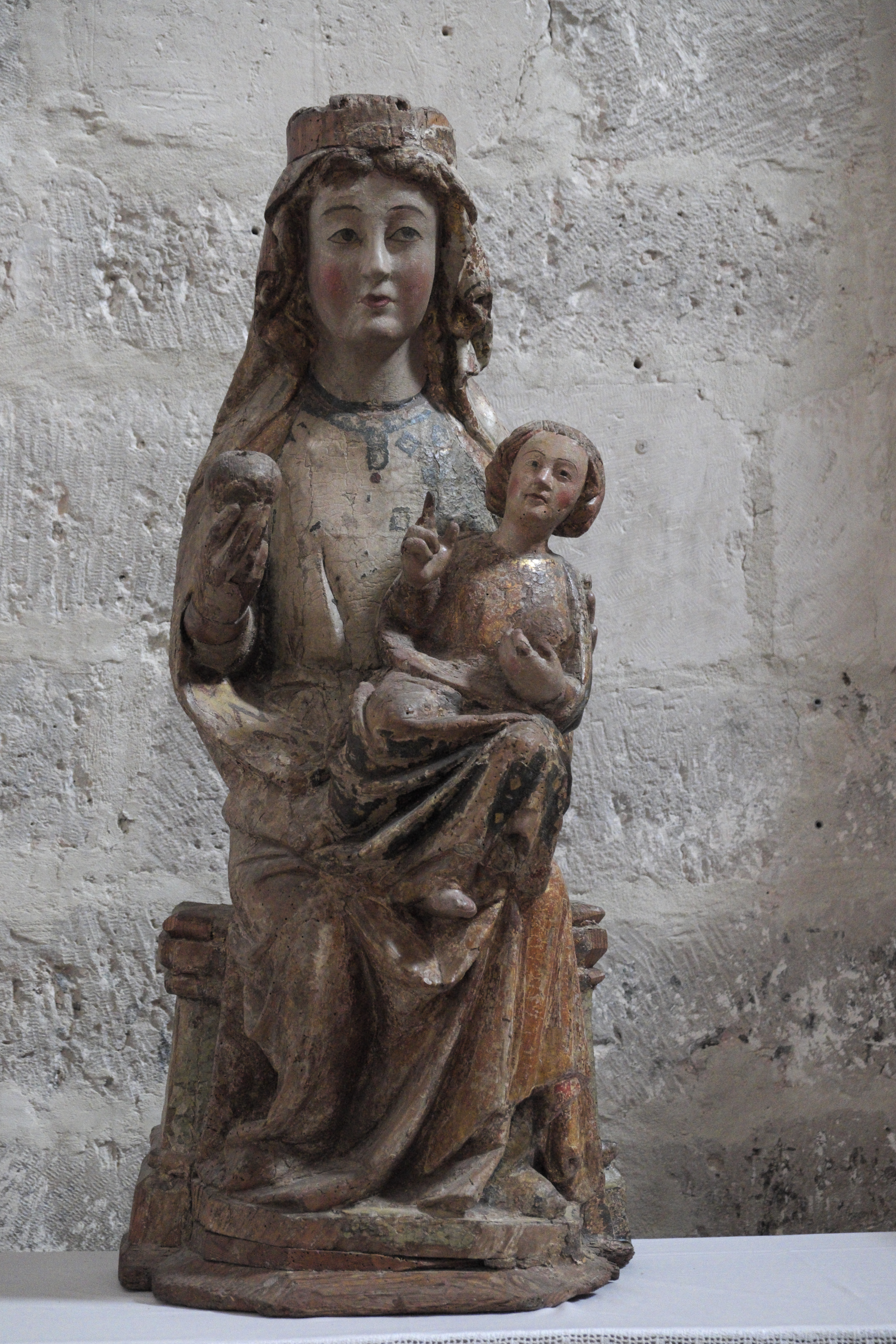 Kirche Asunción de Nuestra Señora (Mariä Himmelfahrt) in Santa María del Campo in der Provinz Burgos (Kastilien-León/Spanien), Madonna mit dem Apfel, aus dem 13. Jahrhundert